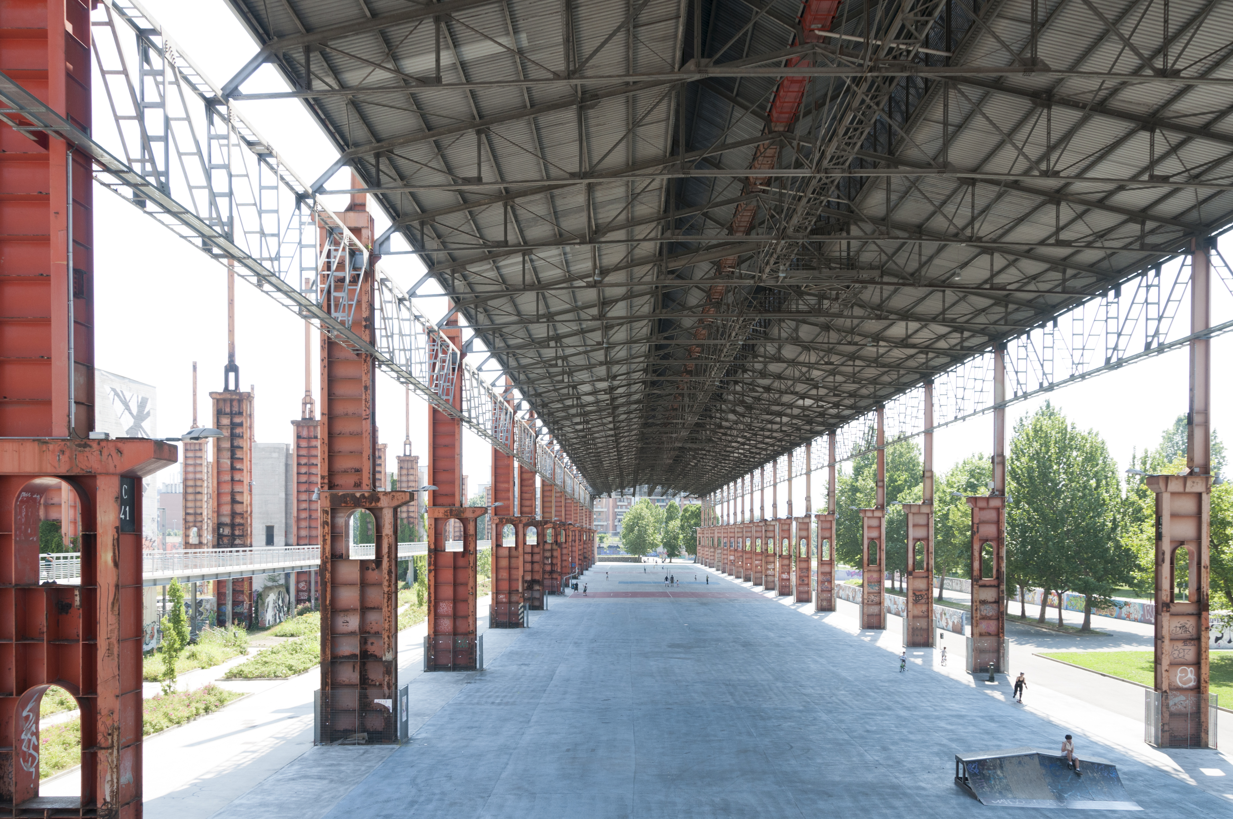 Parco Dora lotto Vitali